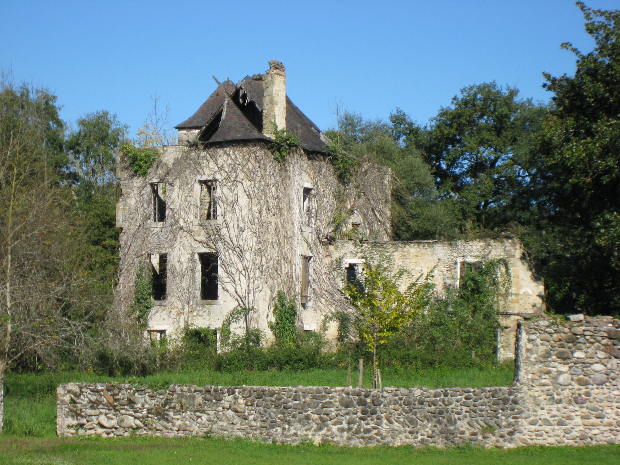 Vue du château Bazerques de Précilhon (Pyrénées Atlantiques) Pyrénées).